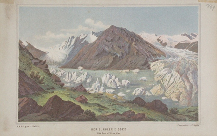 Der Gurgler Eissee. (Ötztal).